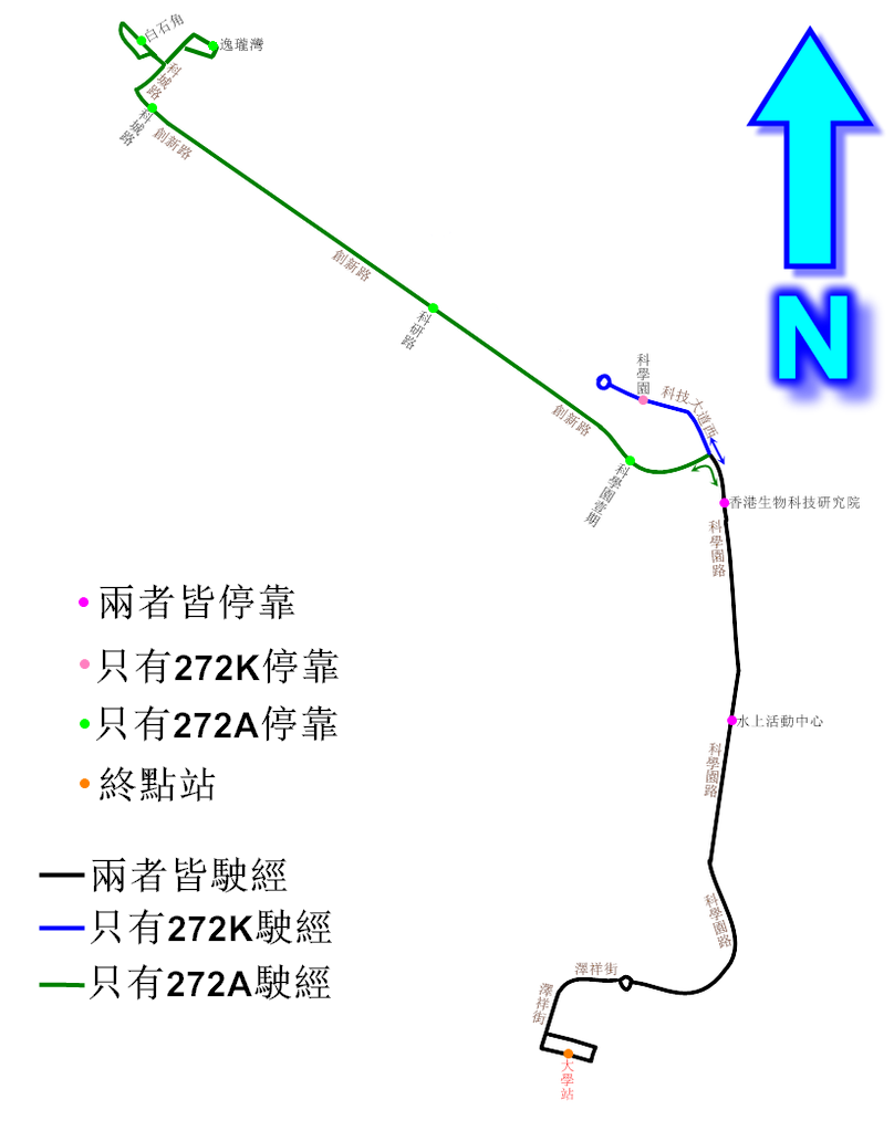 中文（香港）: 九巴272A線及272K線的走線圖，當中藍線表示只有272K駛經，而綠線則只有272A線駛經